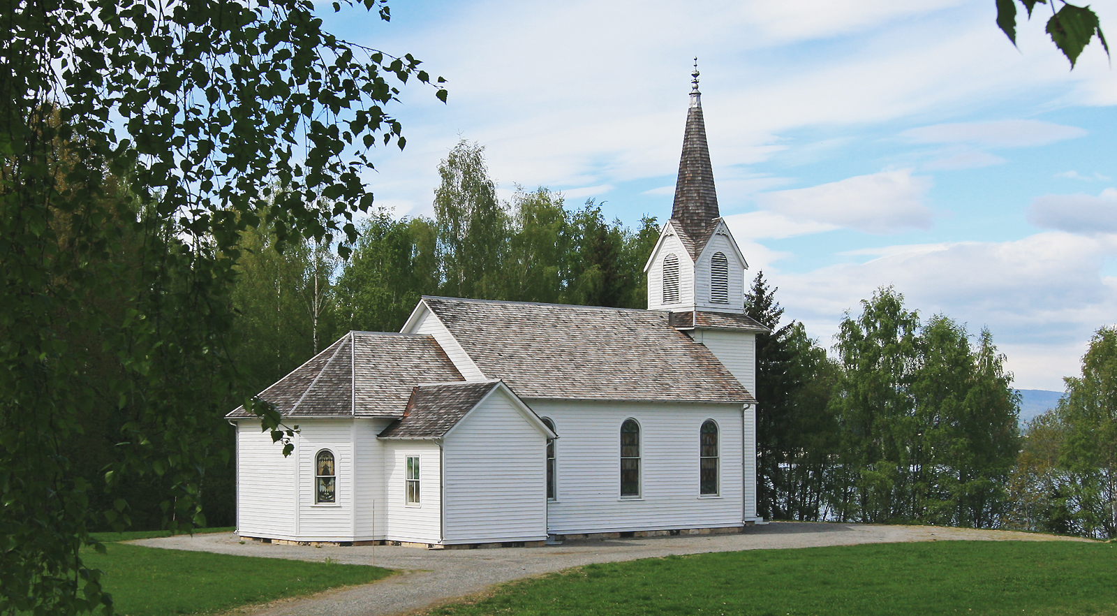 Norsk utvandrermuseum / Norwegian Emigrant Museum, Stange, Norway.